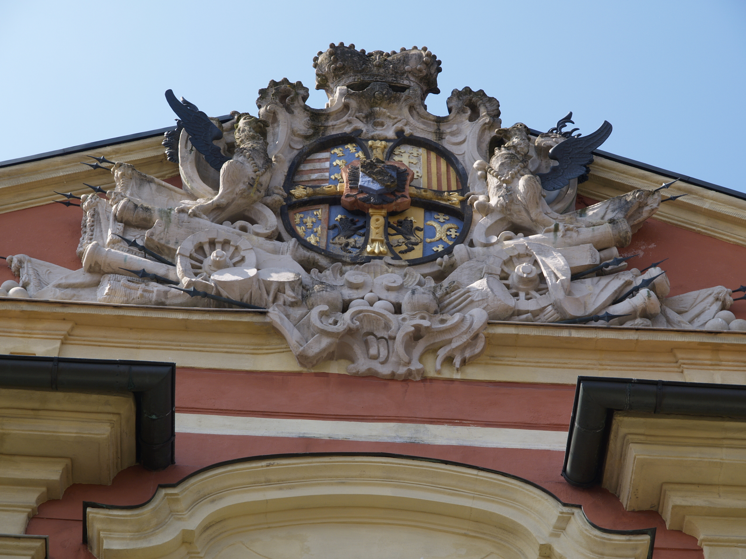 Dinkelsbühl: Wappen am Deutschordensschloss